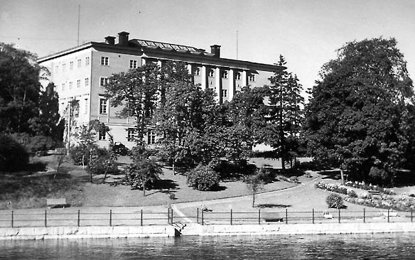 Tampereen 1925 valmistunut kirjastotalo Tammerkosken yli idästä päin kuvattuna noin vuonna 1927. Kuva: Valokuvaamo N. Rasmunsen, Tampereen museoiden kuva-arkisto.